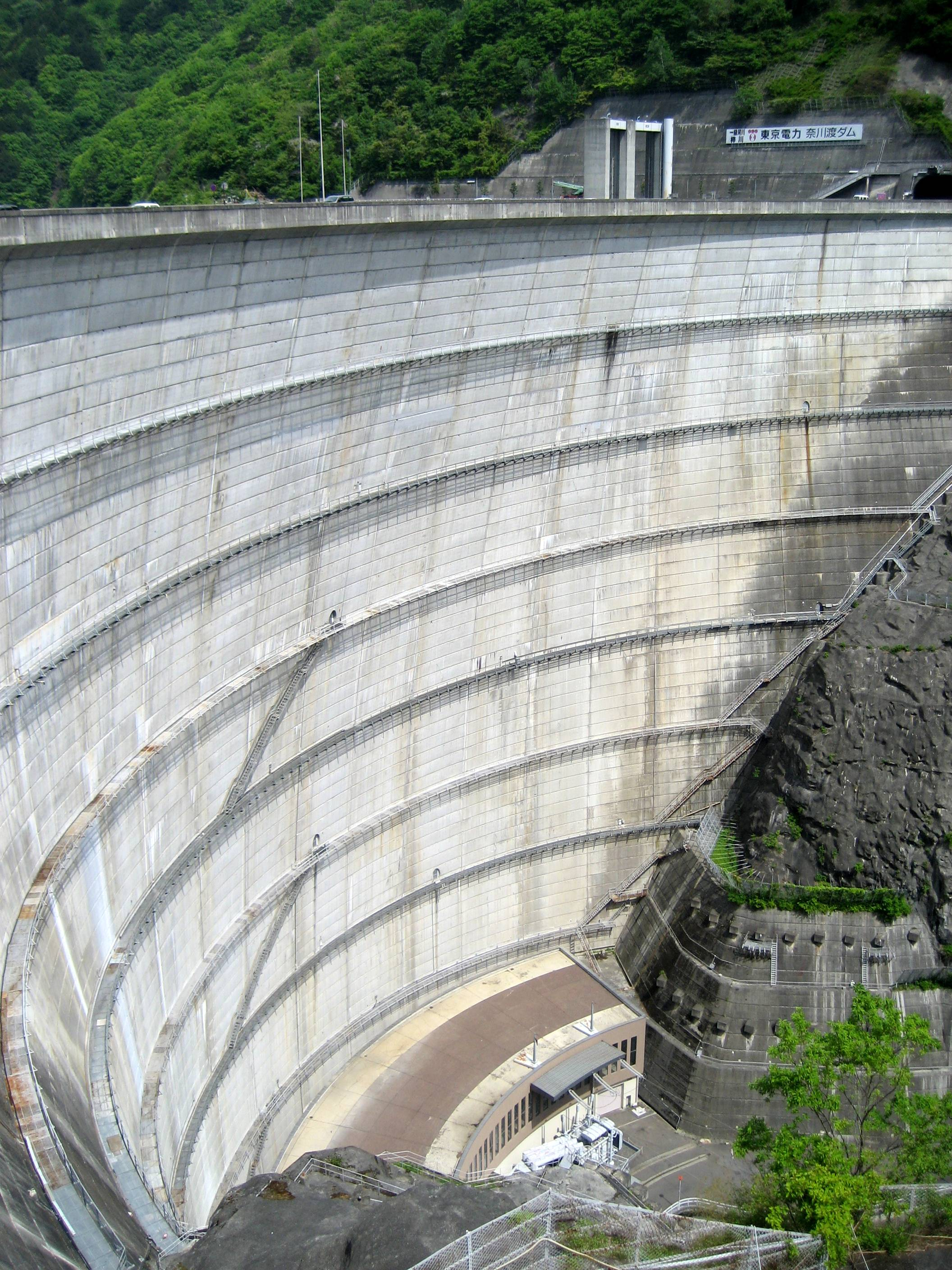 Nagawado Dam (奈川渡ダム) is a dam in Matsumoto city, Nagano prefecture, Japan.